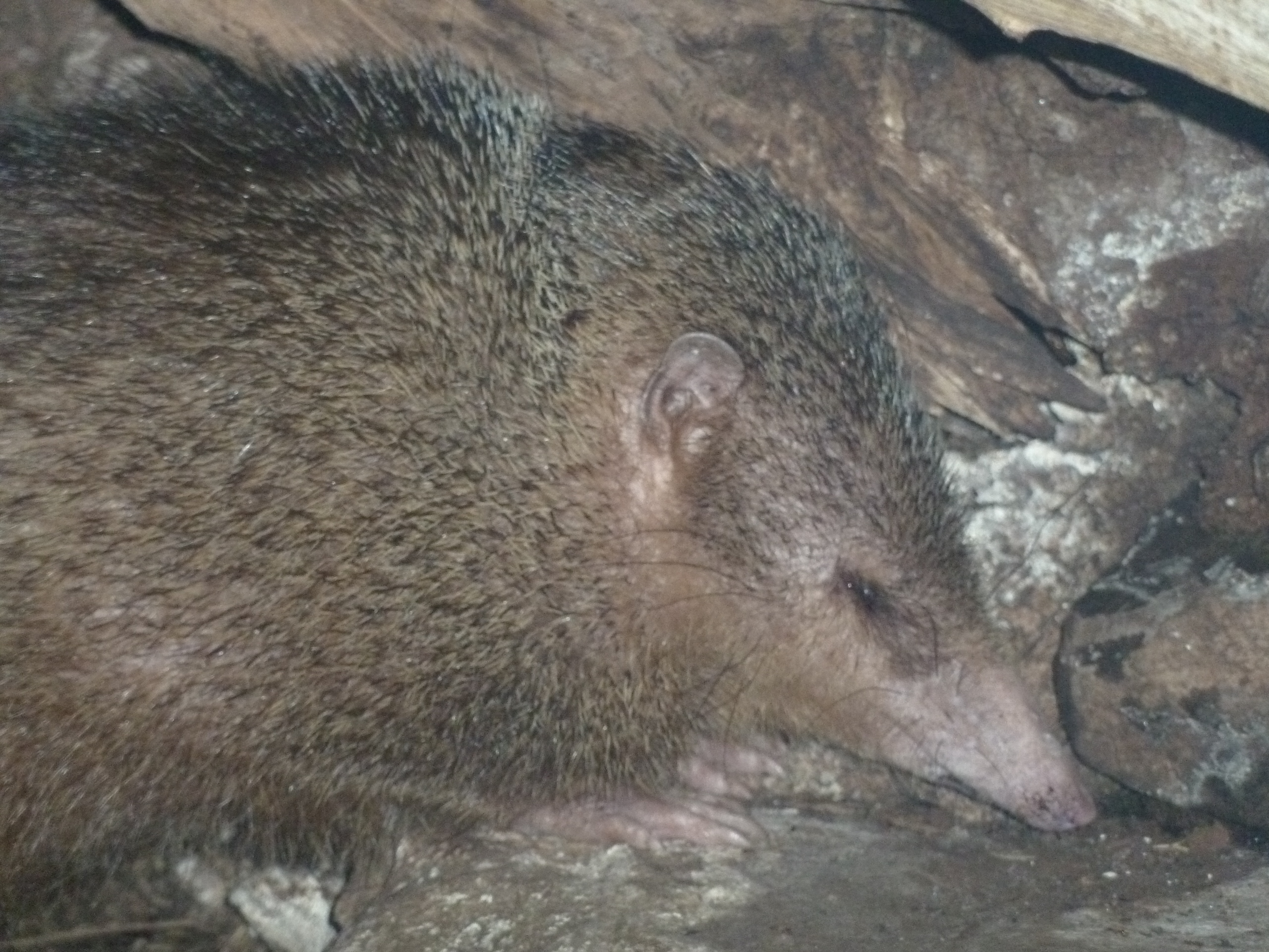 Großer Tanrek im Kleinsäugerhaus